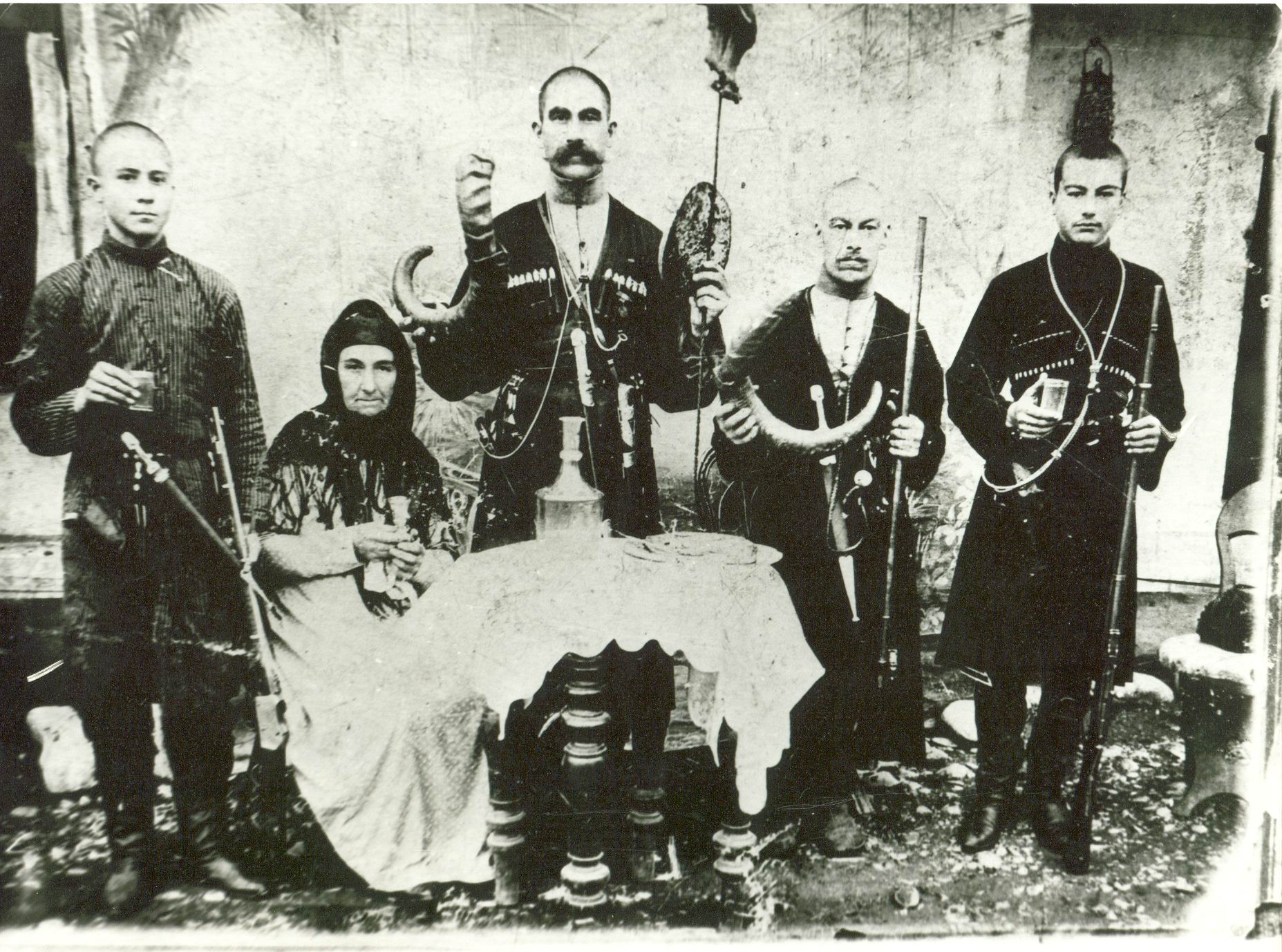 Созановы